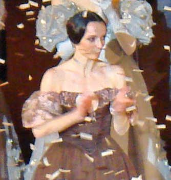 L'ovation faite à Manuel Legris (au centre), danseur étoile du ballet de l'Opéra pour sa dernière représentation dans Eugène Onéguine, le 15 mai 2009. Manuel Legris a été nommé le 11 juillet 1986, à la suite de son interprétation du rôle de Jean De Brienne dans le ballet Raymonda, chorégraphié par Rudolf Noureev, lorsque ce dernier était directeur de la Danse à l'Opéra de Paris. L'exposition Rudolf Noureev à Moulins A gauche sur la photo au 2ème plan : Clairemarie Osta (danseuse étoile dans le rôle de Tatiana), à droite sur la photo au 2ème plan : Myriam Ould-Braham (première danseuse dans le rôle d'Olga, soeur de Tatiana). Tout à gauche, le chef d'orchestre : James Tuggle. A l'arrière, les danseurs du corps de ballet.